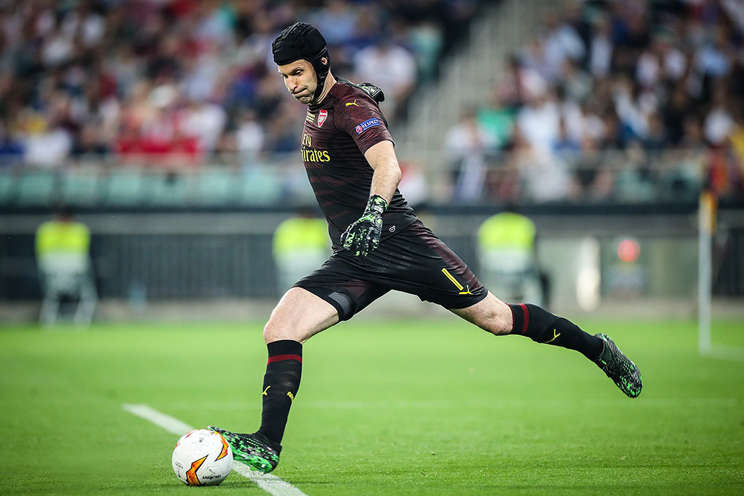 مسابقه چلسی و آرسنال، فینال لیگ اروپا ۲۰۱۹